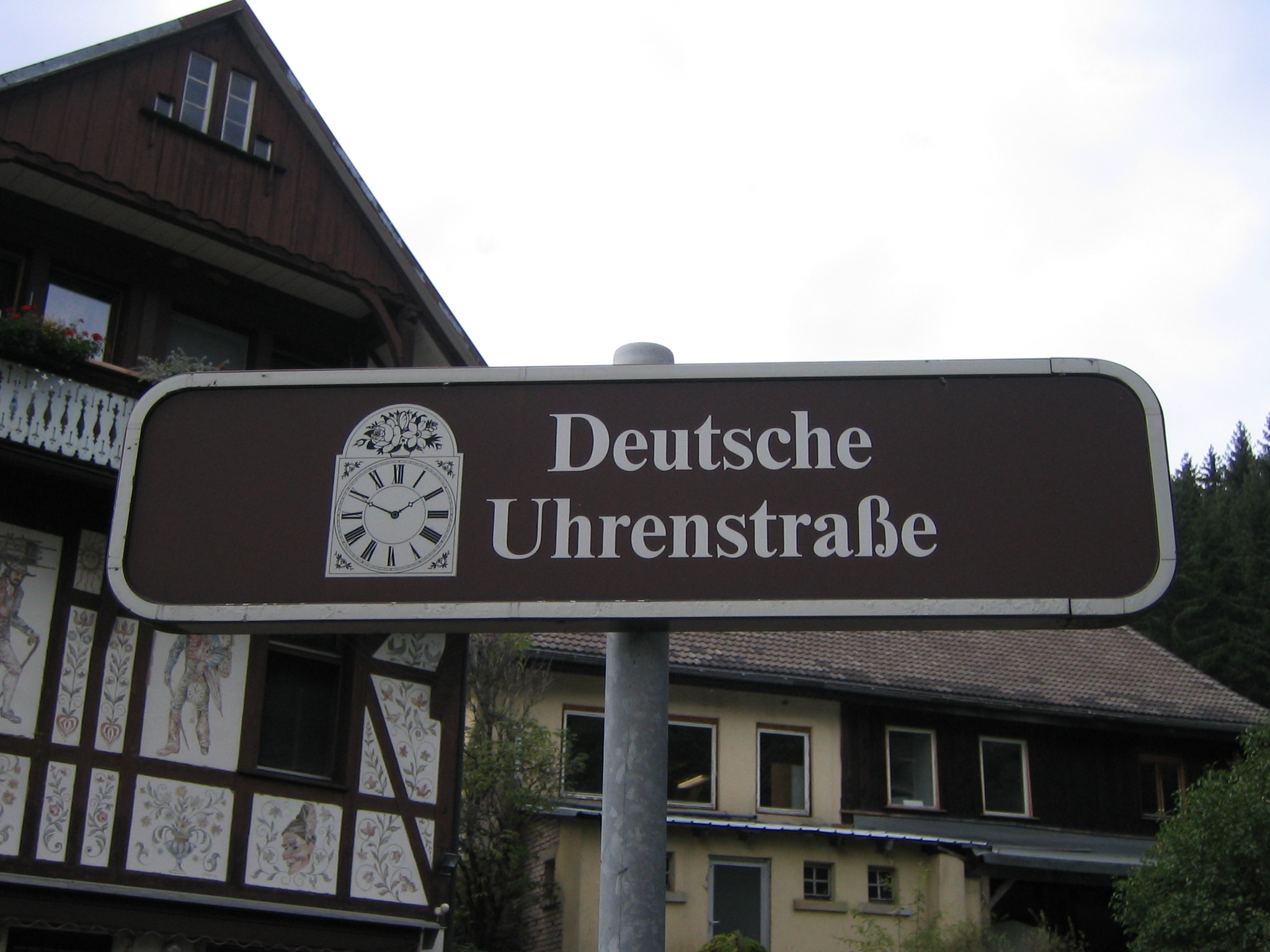 Straßenschild der Deutschen Uhrenstraße in Lenzkirch